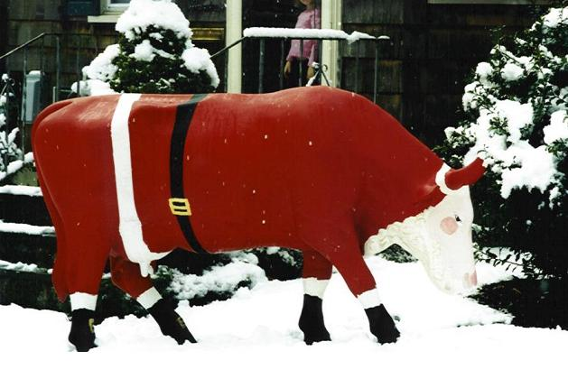 Gladys as Santa